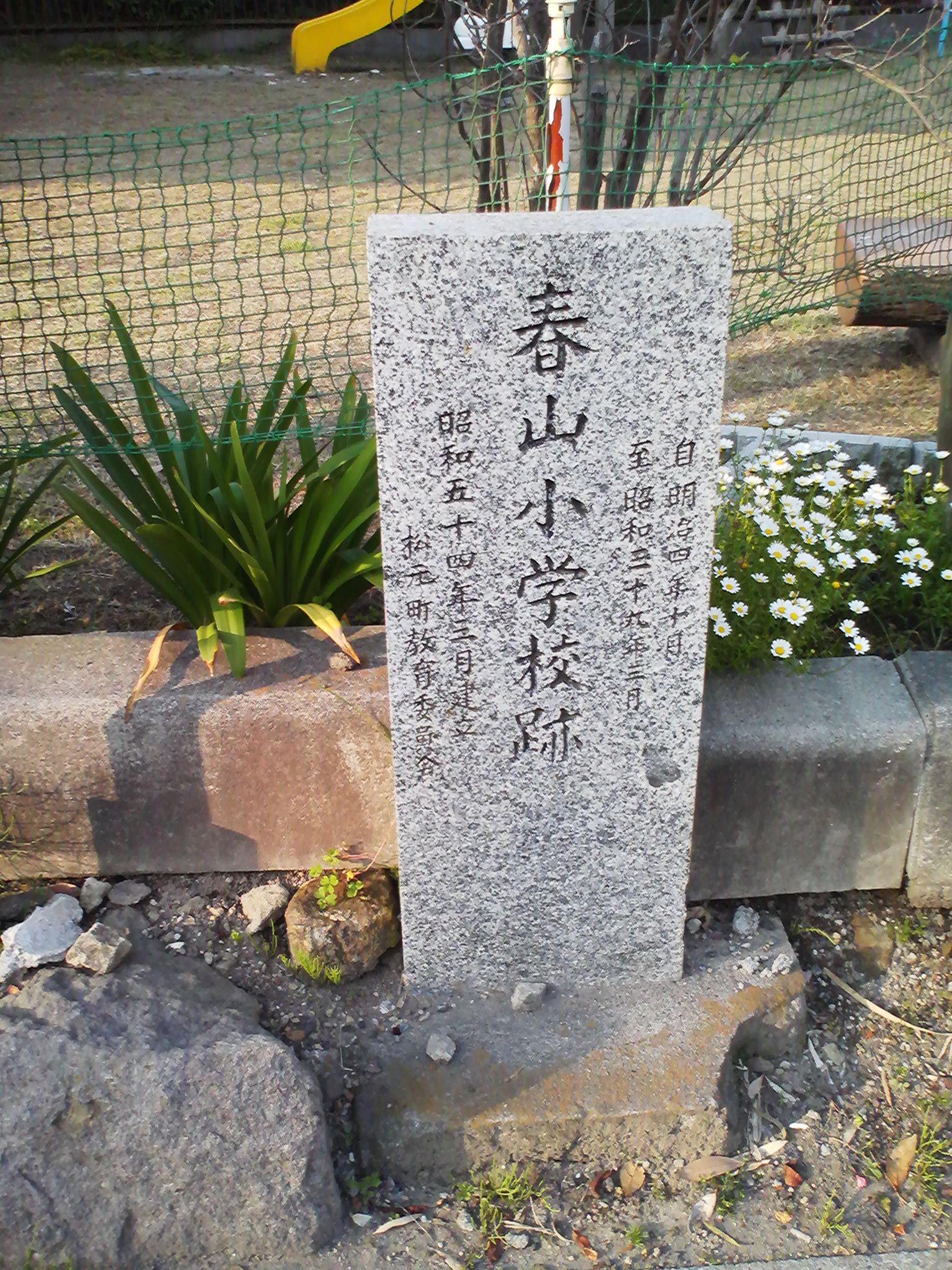 鹿児島市立春山小学校の跡地の記念碑